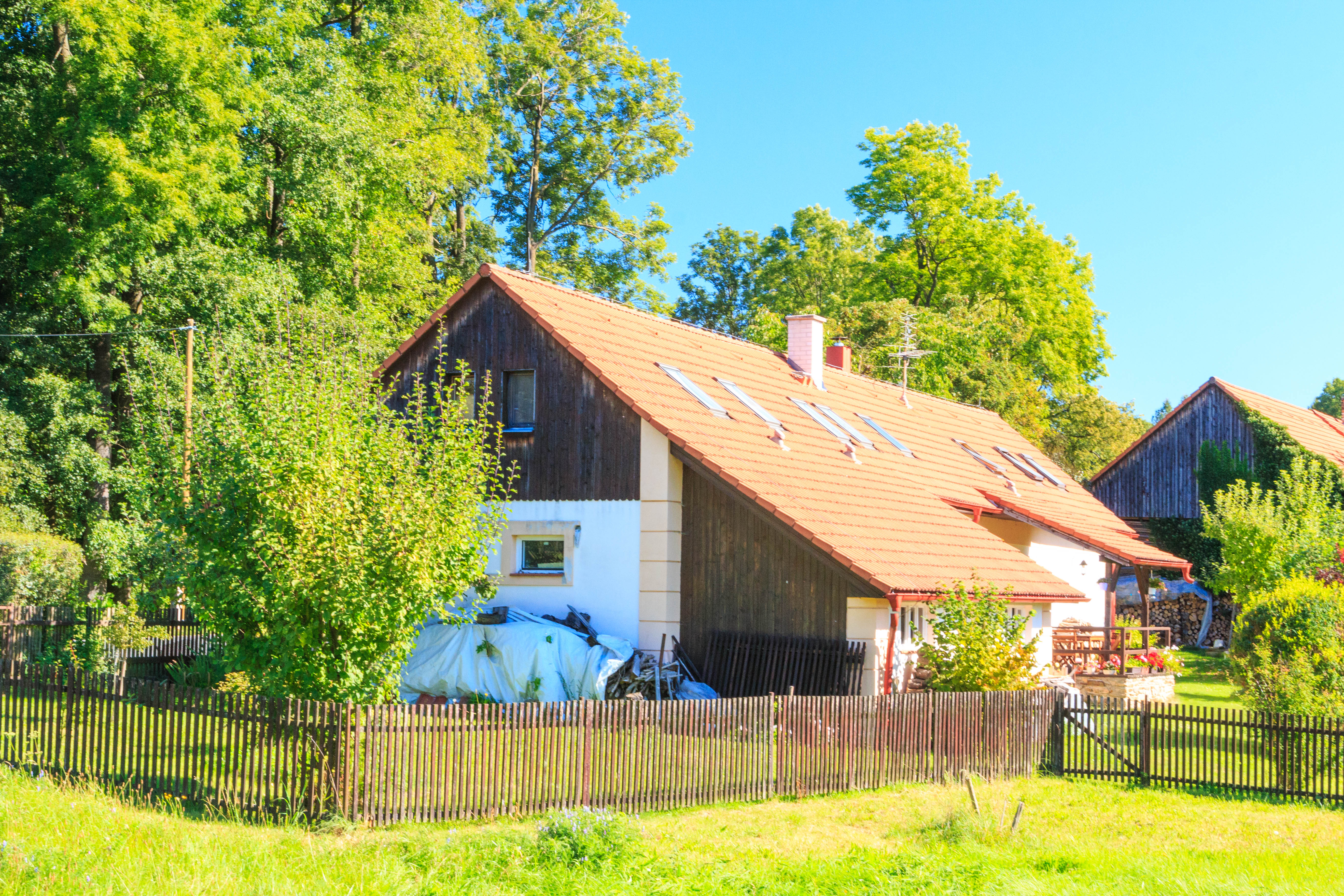 Pavlovice u Vlastějovic - čp. 16